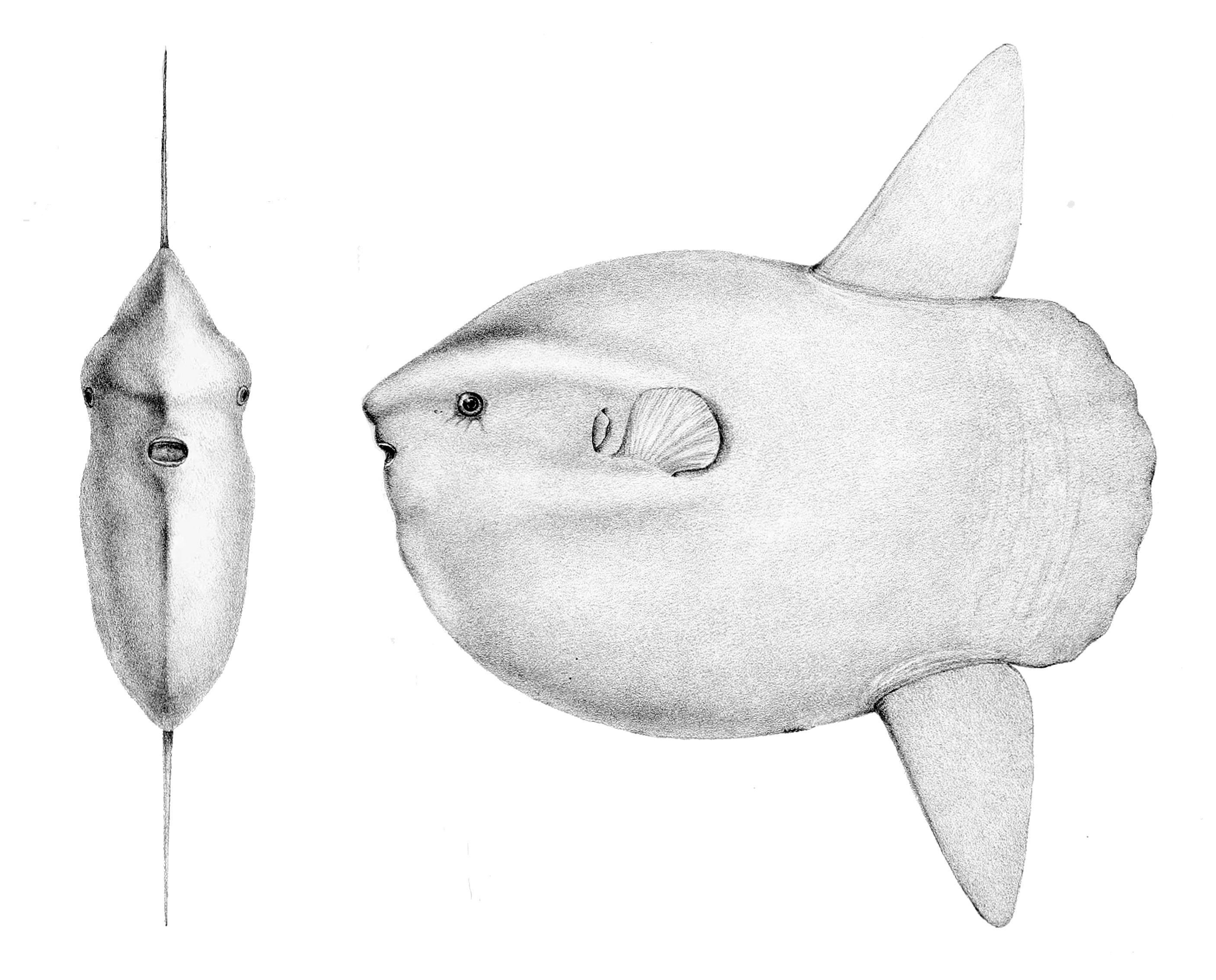 Mola mola